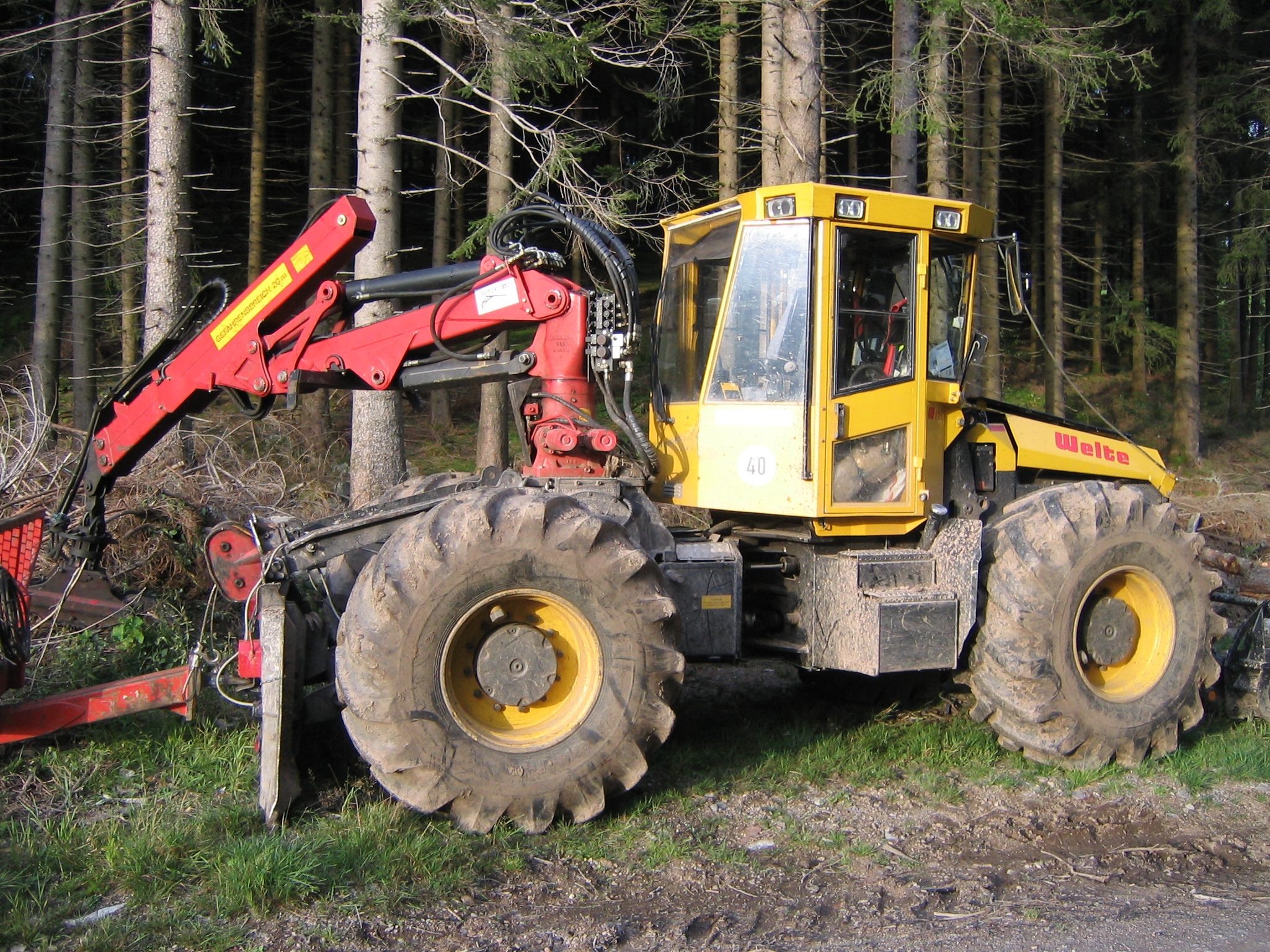 Skidder Welte W115